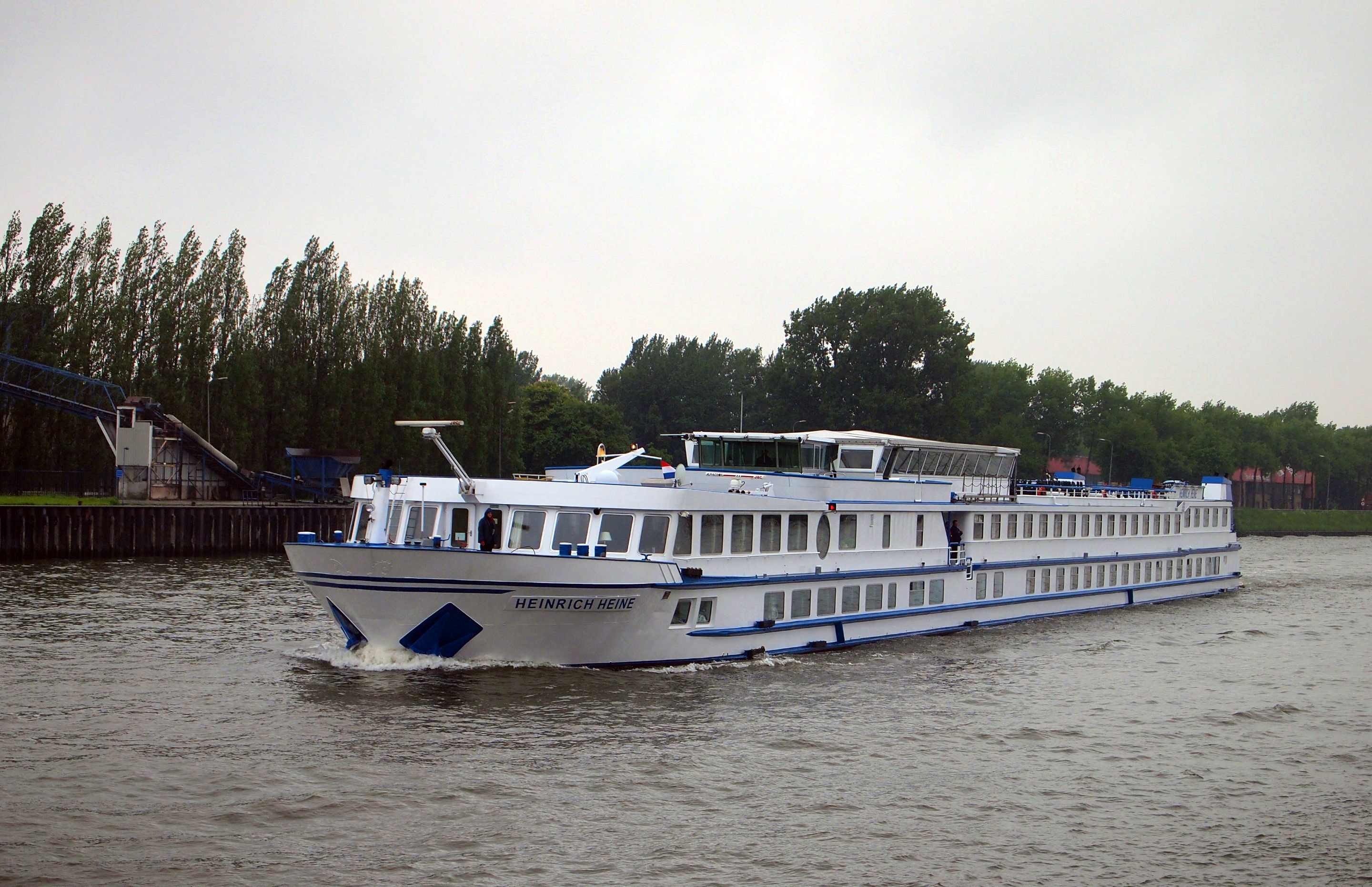 Flusskreuzfahrtschiff Heinrich Heine auf Fahrt auf dem Rhein